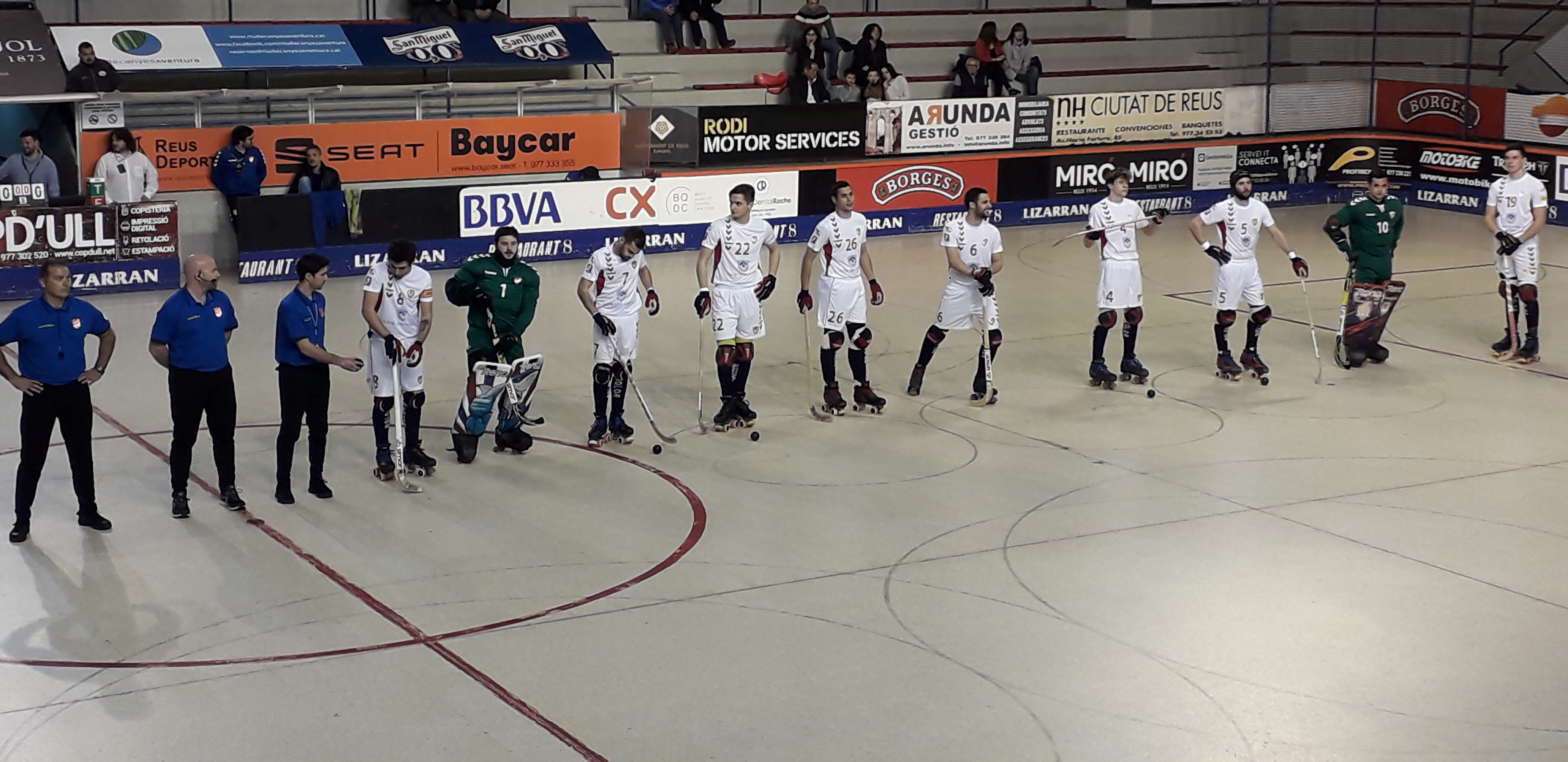 Plantilla Igualada Hoquei Club